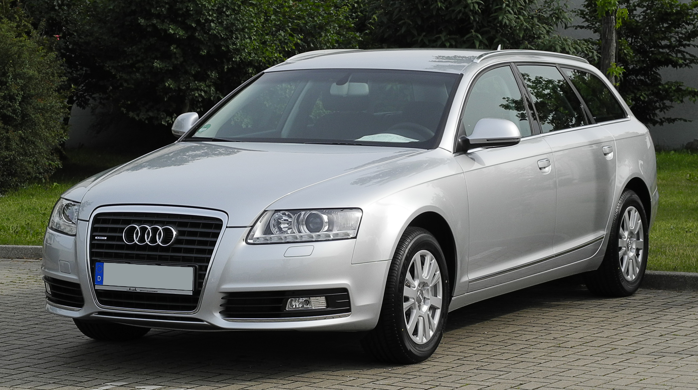 Audi A6 Avant (C6, Facelift)